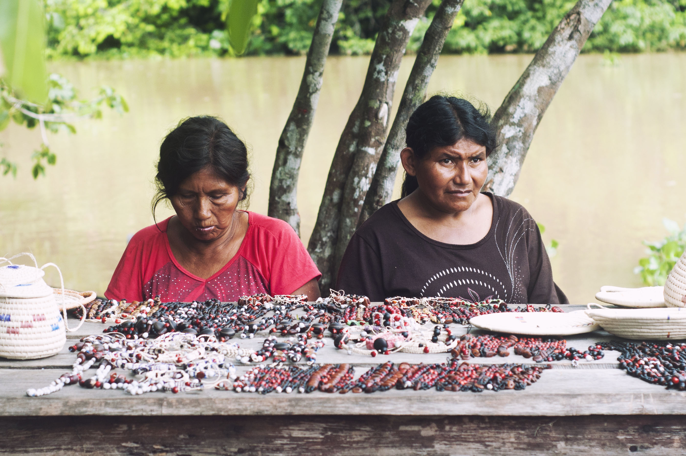 Las artesanas de Warao, Orinoco